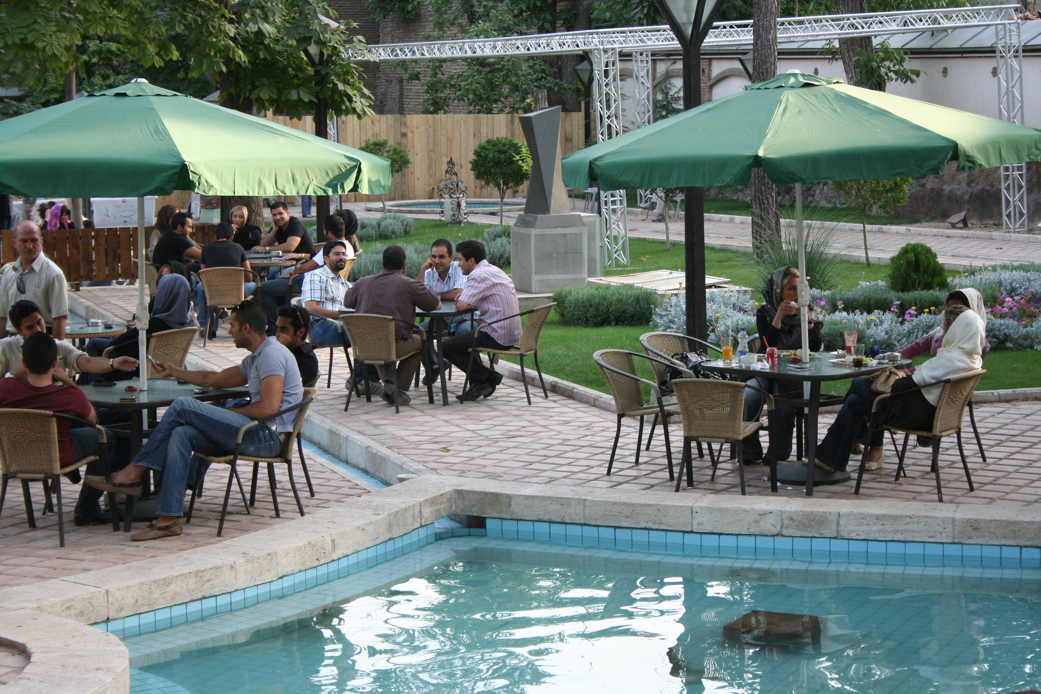 Iranian Art Museum Garden Cafe Gallery, Dr. Hesabi St., Elahiyeh